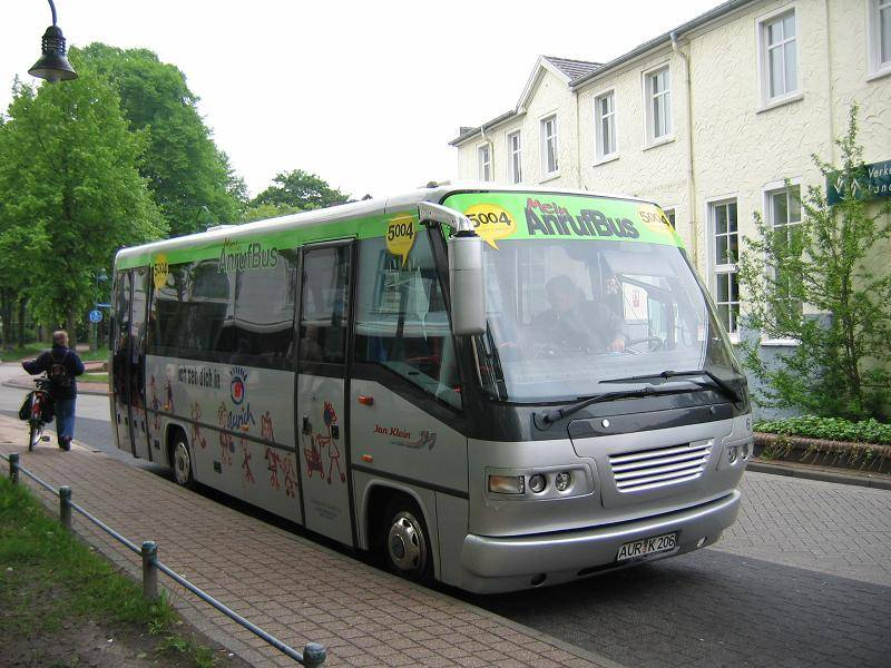 Anrufbus der Kreisbahn Aurich